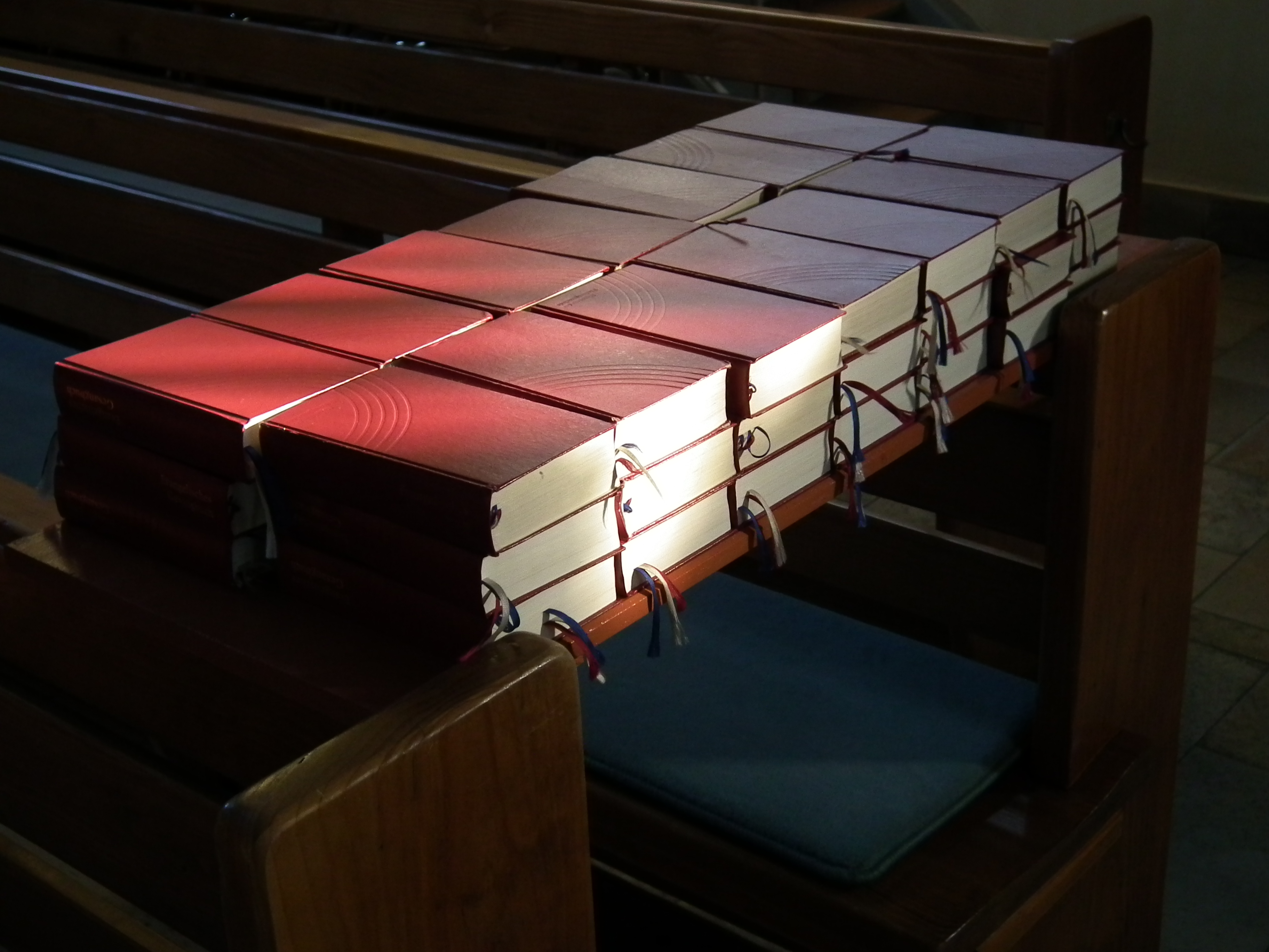 Evangelische Gesangbücher, fotografiert in der Pauluskirche in Eppelheim (Baden-Württemberg, Deutschland)